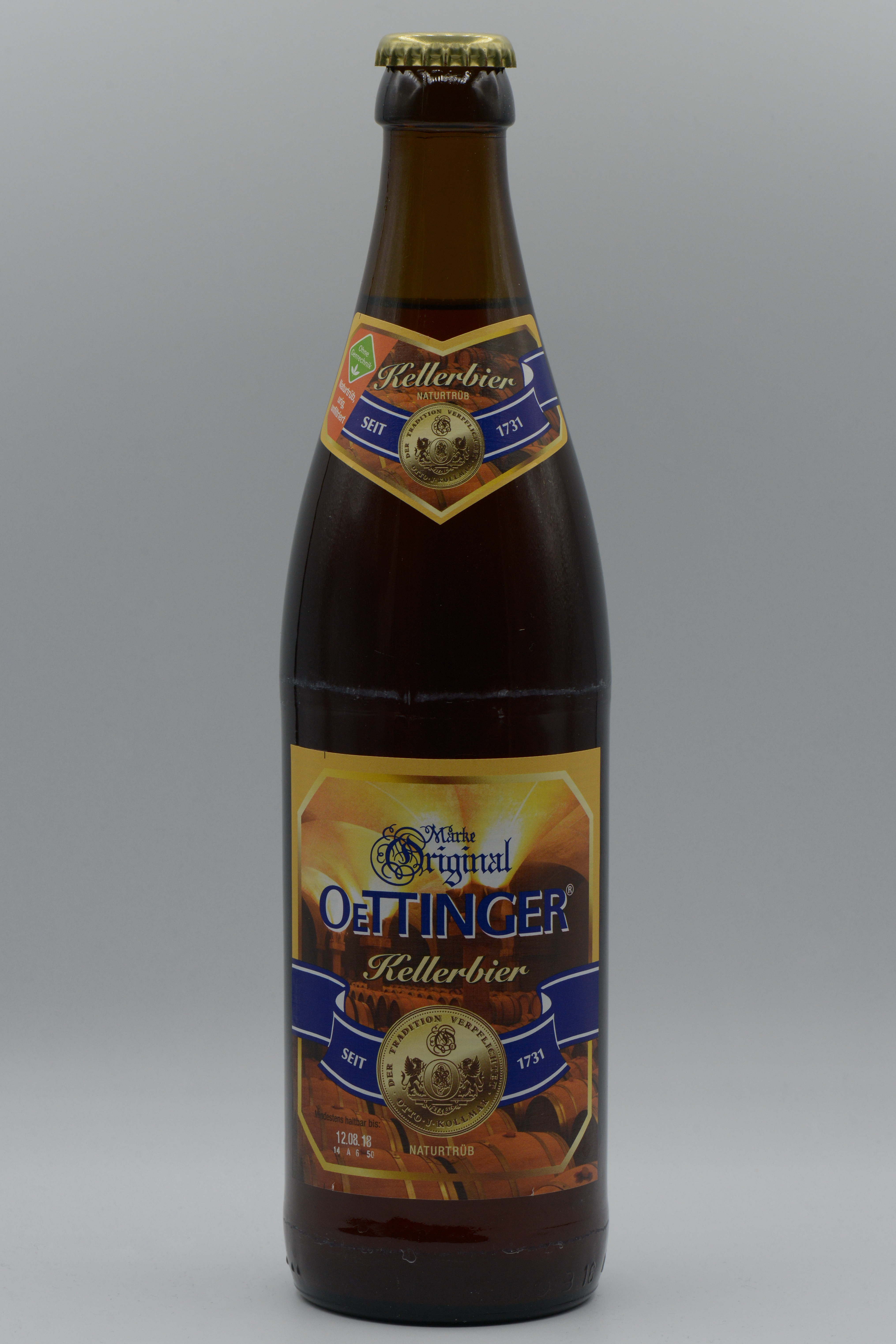 Kellerbier der Oettinger Brauerei GmbH in der NRW-Flasche (2018).